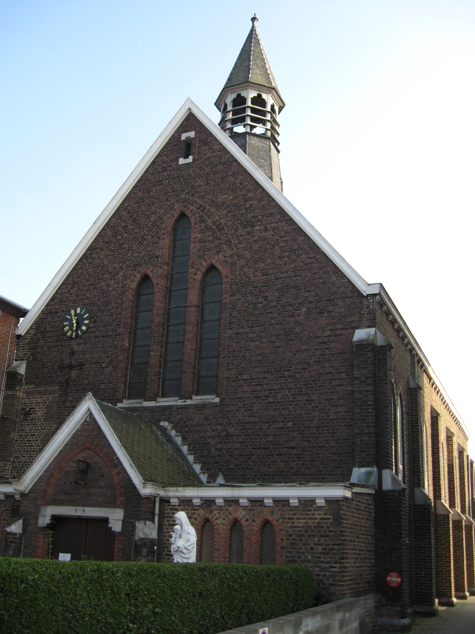 Heilige-Familiekerk in Montegnée, Saint-Nicolas